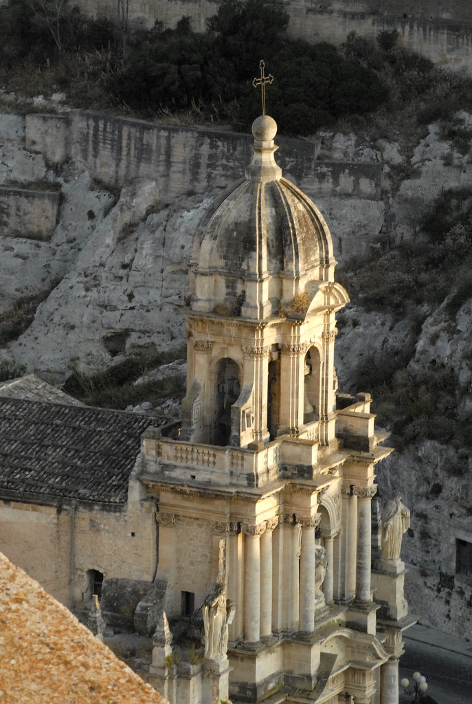 Scicli: la torre campanaria integrata nella facciata della chiesa di San Bartolomeo.